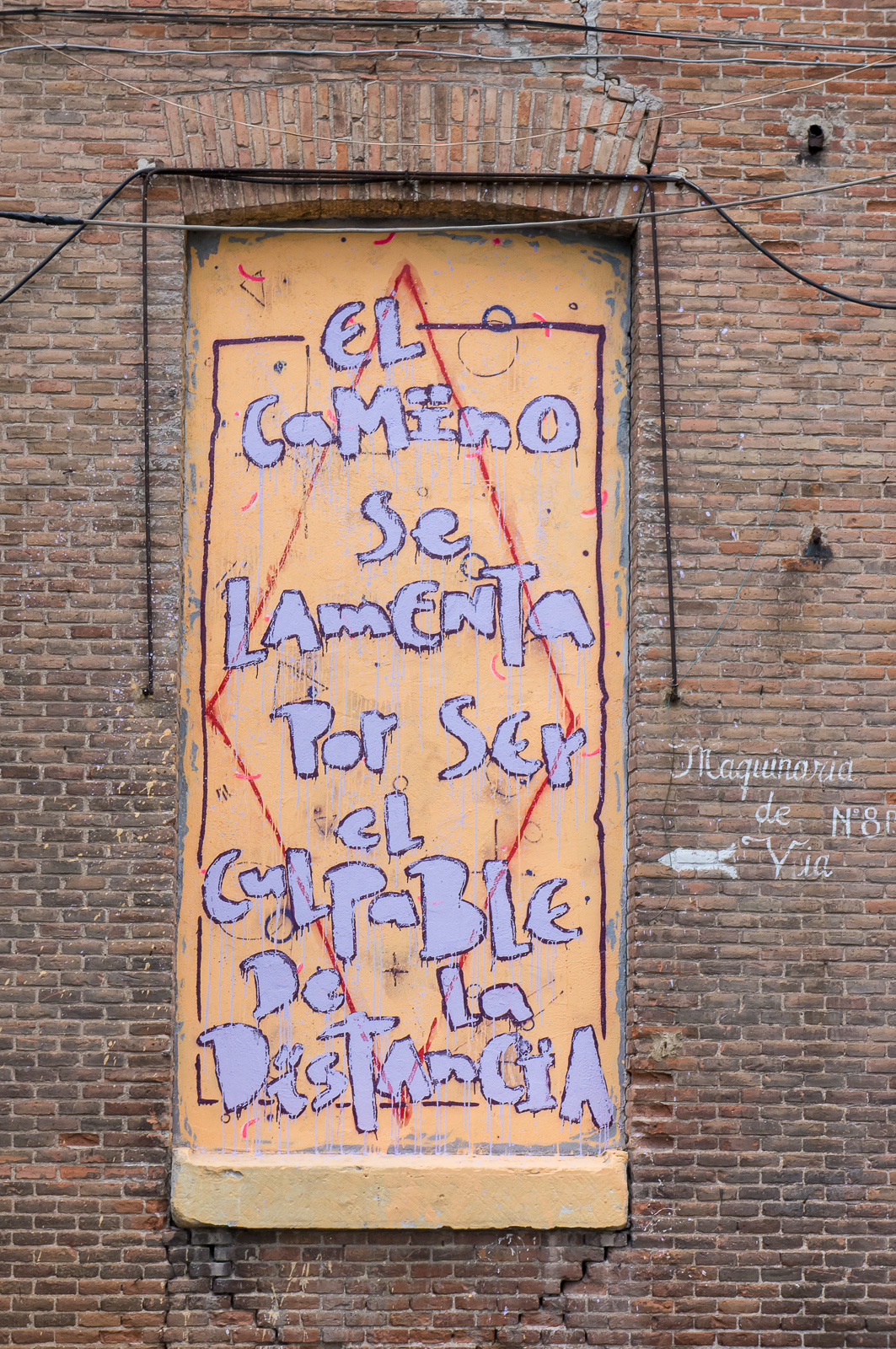 Atocha